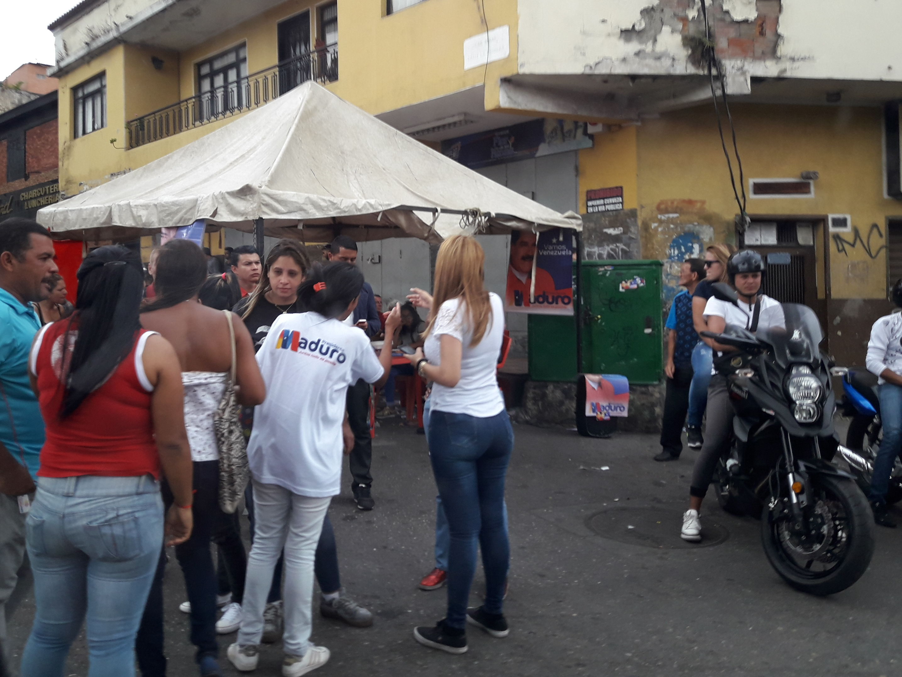 Punto rojo cerca de un centro electoral en Caracas, violatorio de las leyes electorales, durante las elecciones presidenciales de 2018.